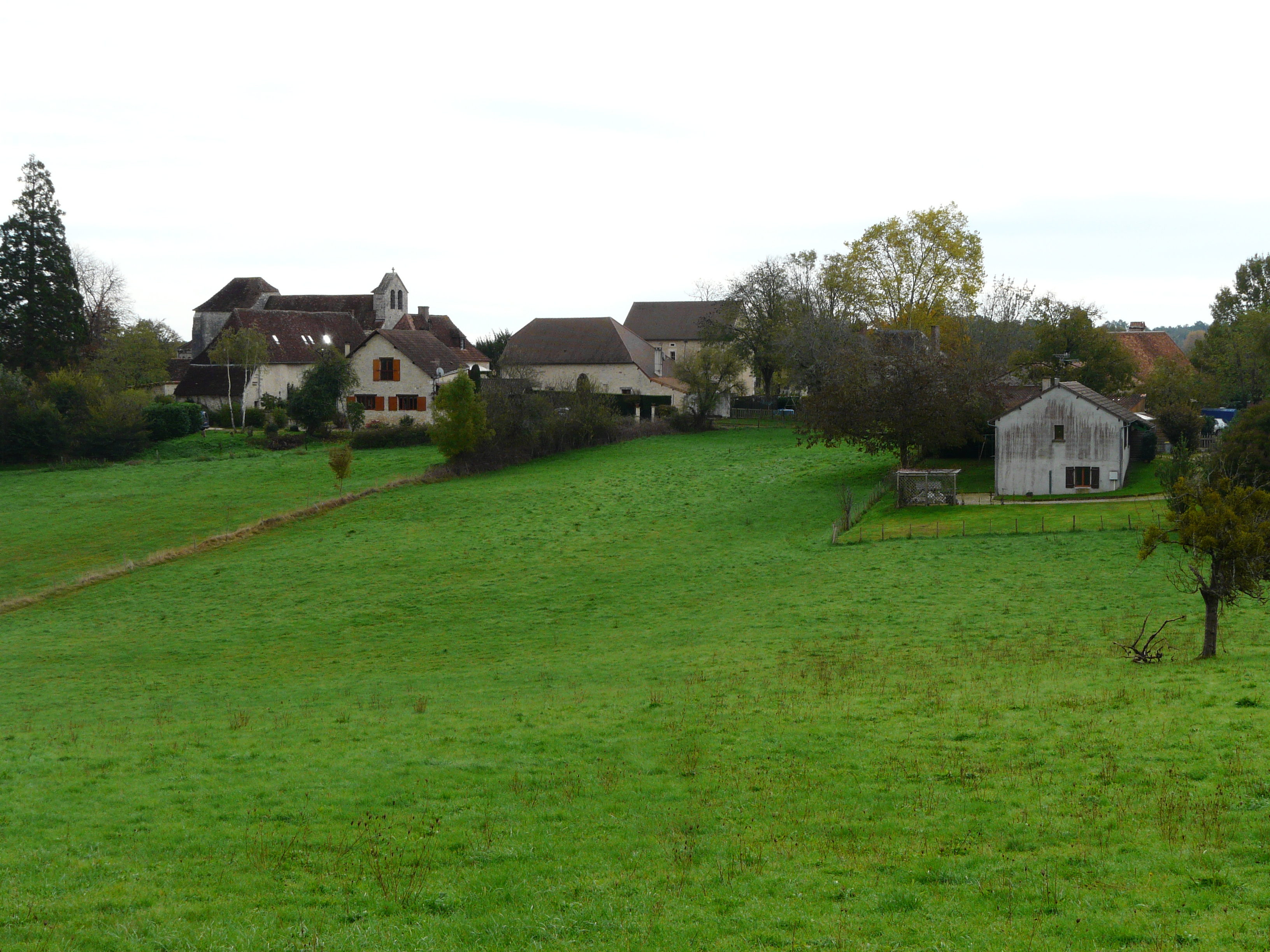 Le village de Limeyrat, Dordogne, France.